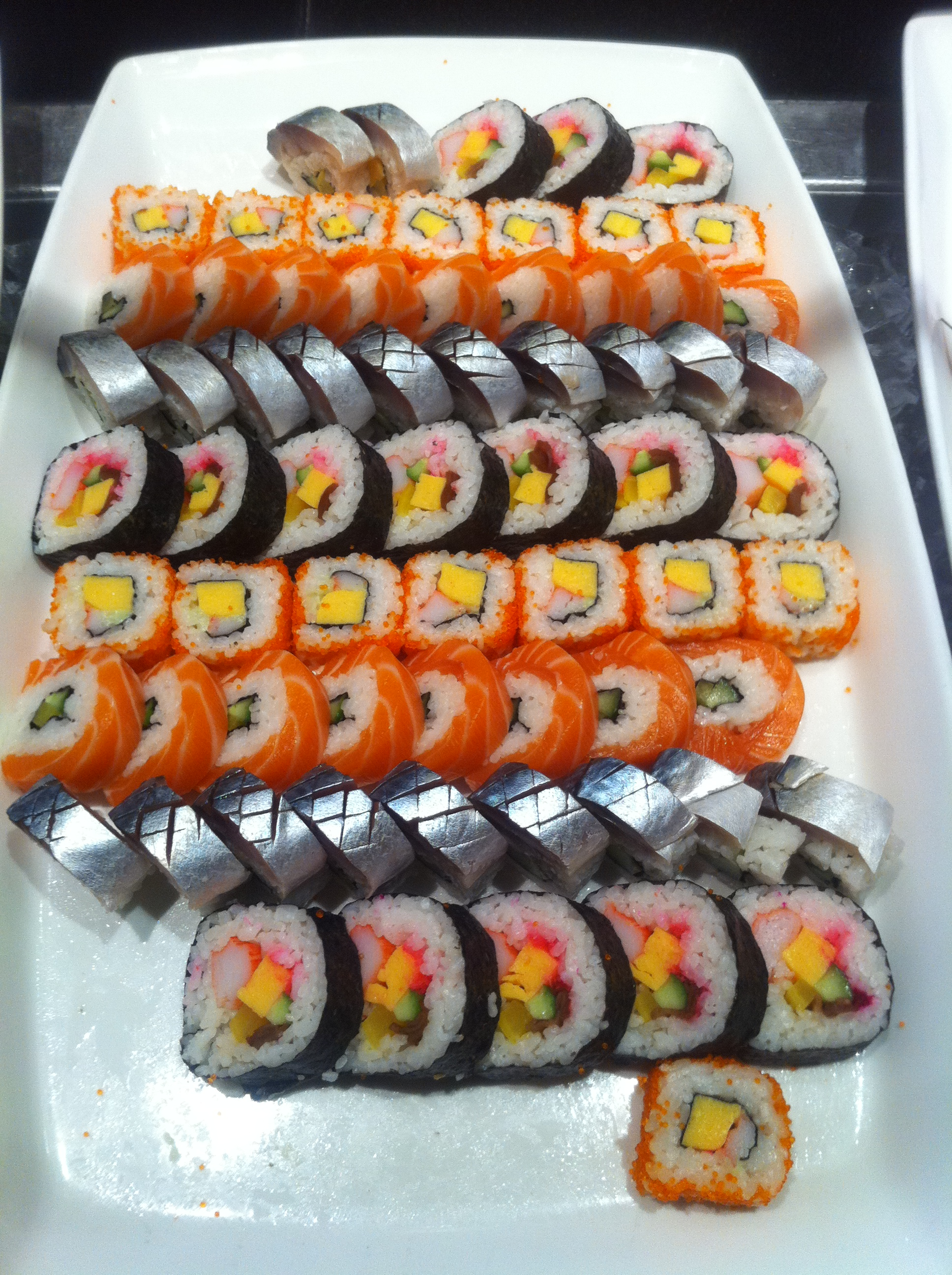 中文（香港）: 香港怡東酒店 自助餐 壽司